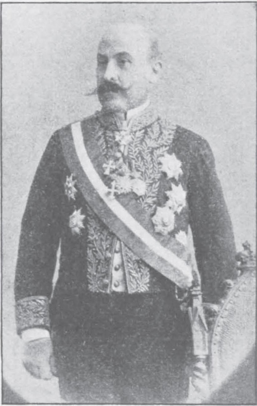 Αυλάρχης του Βασιλιά